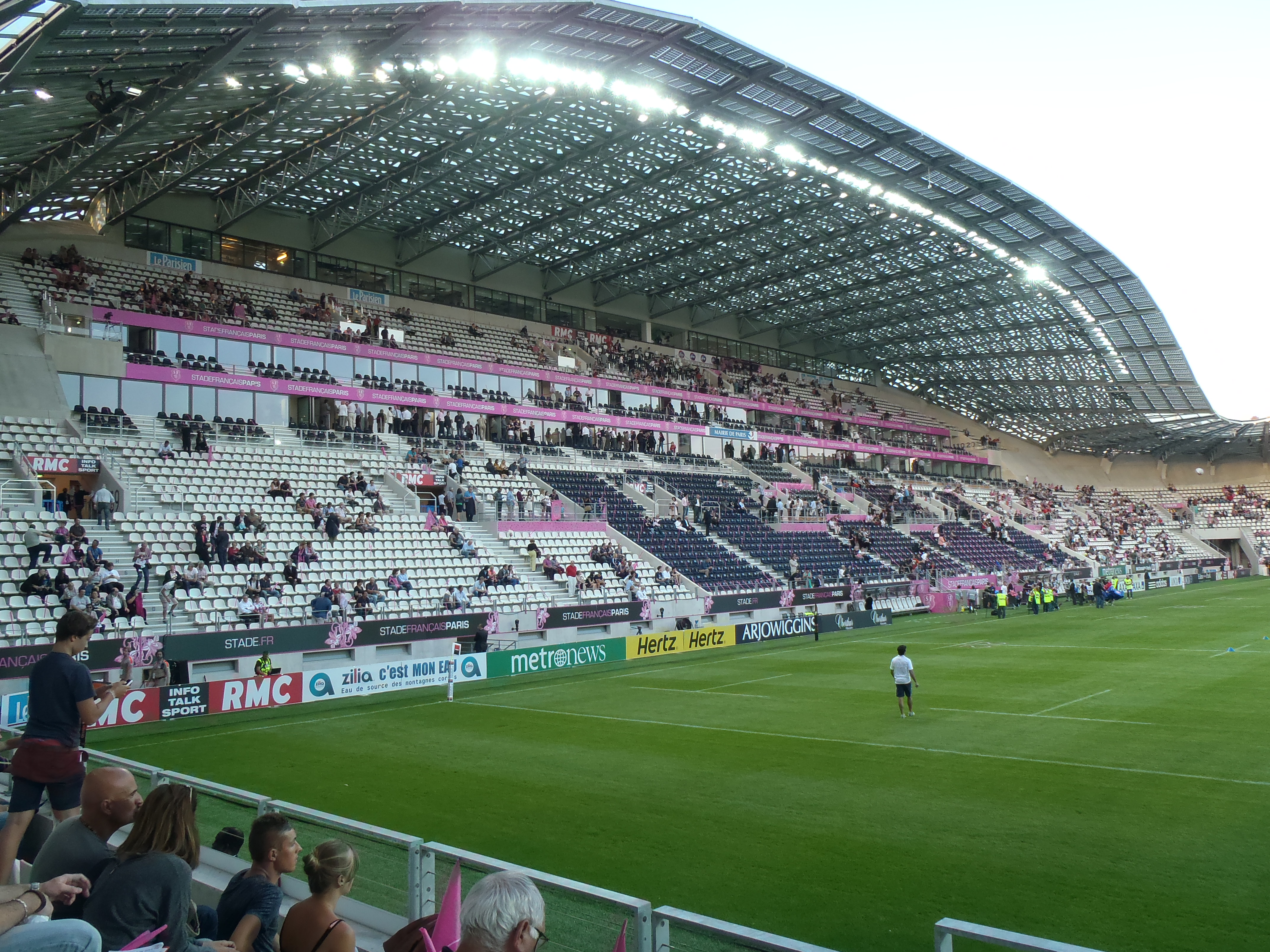 tribune présidentielle nouveau stade Jean Boin Paris